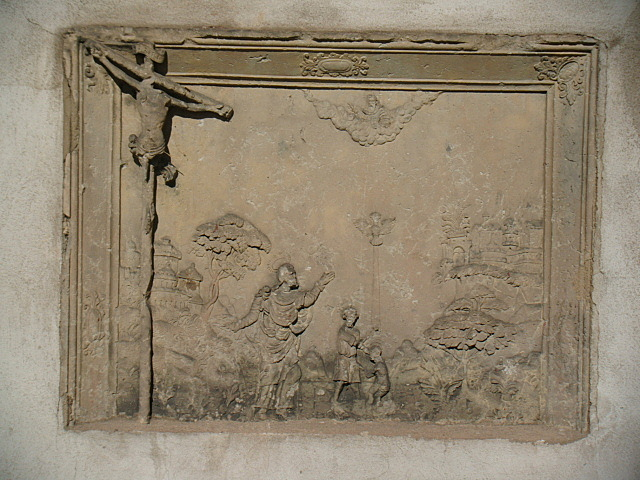 Kostel Narození P. Marie (Benešov nad Ploučnicí), Benešov nad Ploučnicí